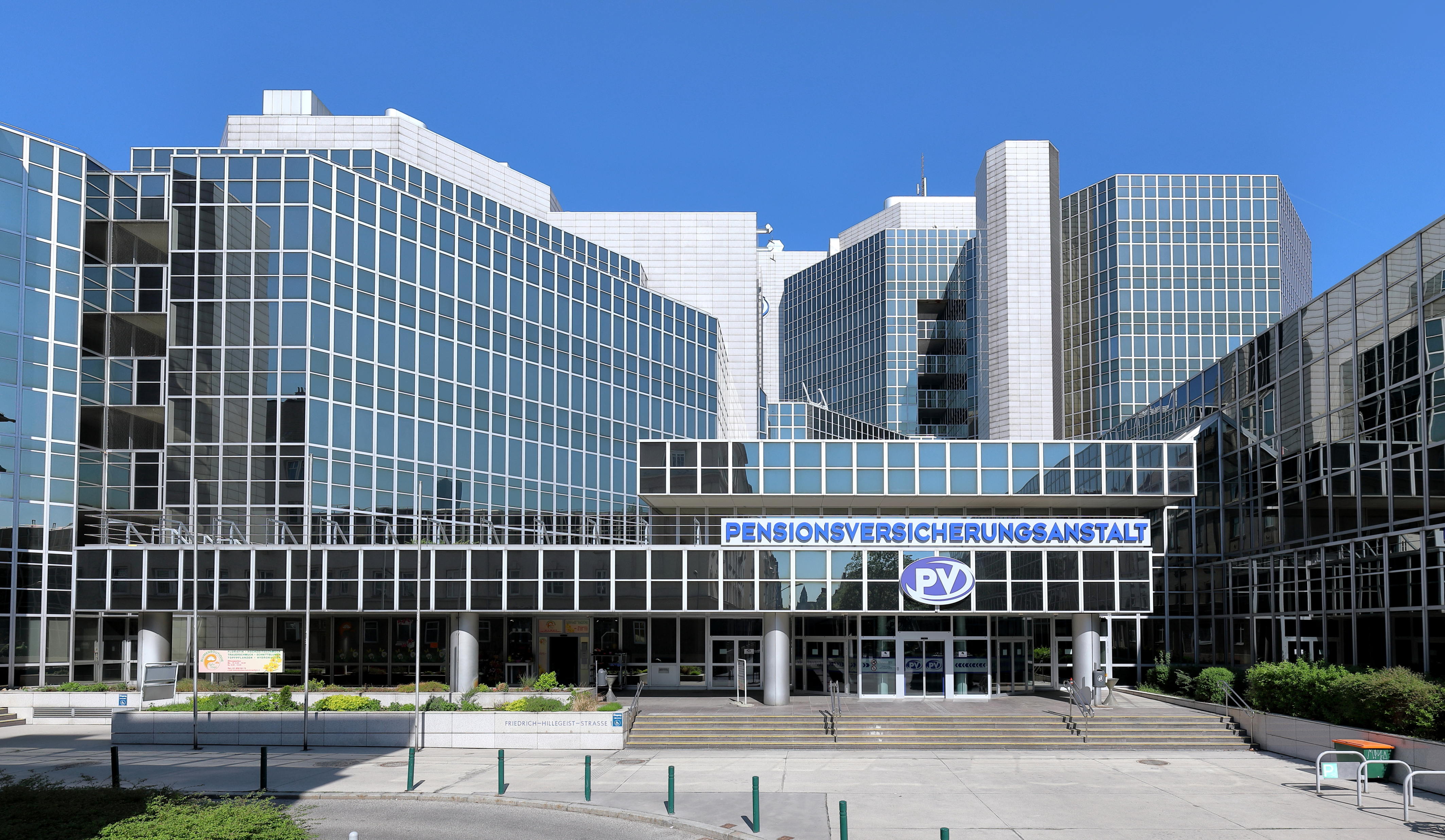 Die Wiener Zentrale der Pensionsversicherungsanstalt (PVA) an der Adresse Friedrich-Hillegeist-Straße 1 im 2. Wiener Bezirk Leopoldstadt.Der Baukomplex am Handelskai wurde von 1977 bis 1981 nach Plänen von Kurt Hlaweniczka und Hannes Lintl (Statik Emil Jakubec) durch die ARGE Porr, Neue Reformbau, Hofman & Maculan, Mayreder und WIBEBA errichtet.